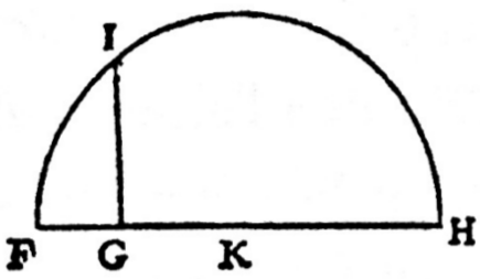 Arrel quadrada a la Geometria de Descartes